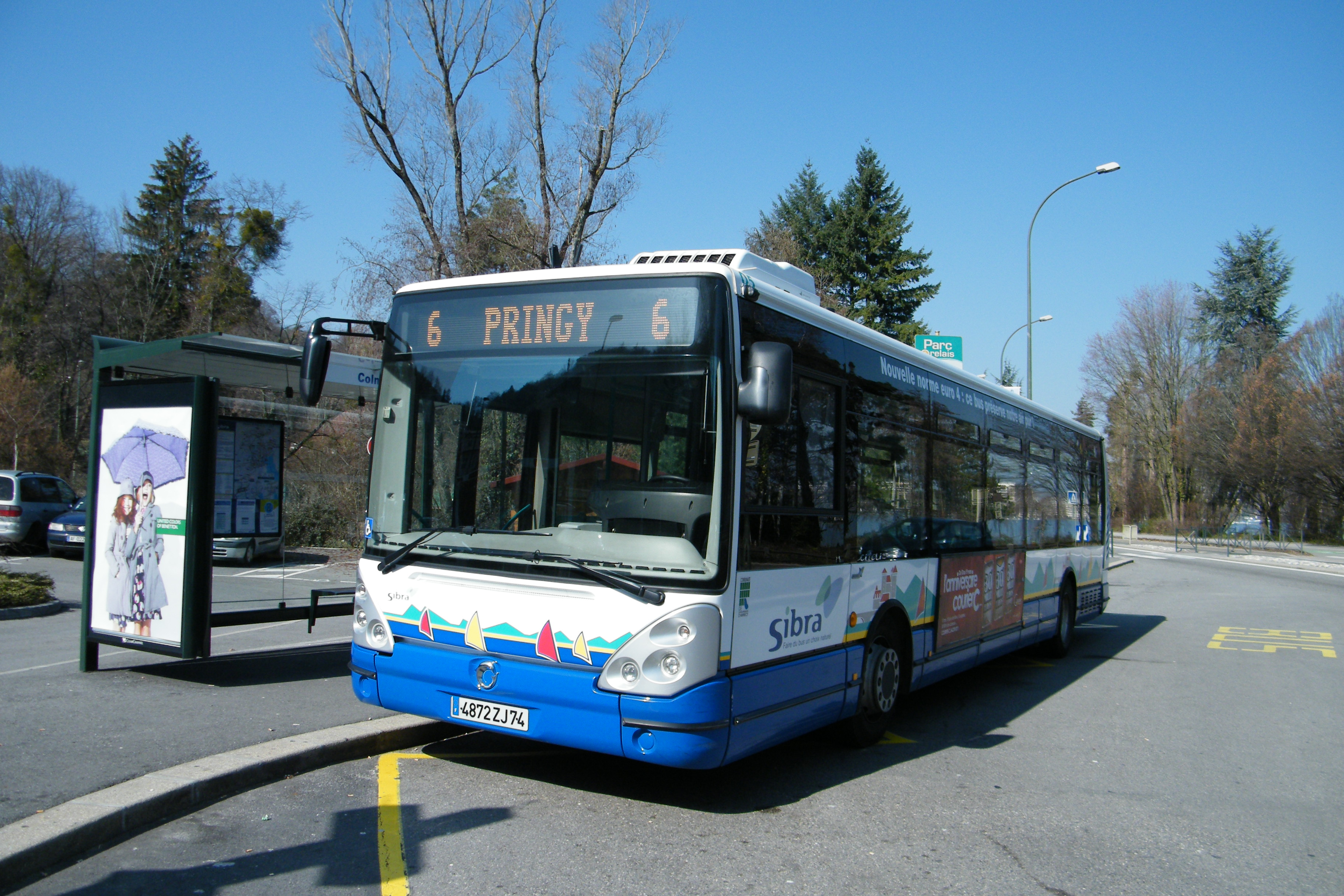 Un Irisbus Citelis 12 du réseau SIBRA est vu au terminus de la Ligne 6, à Colmyr